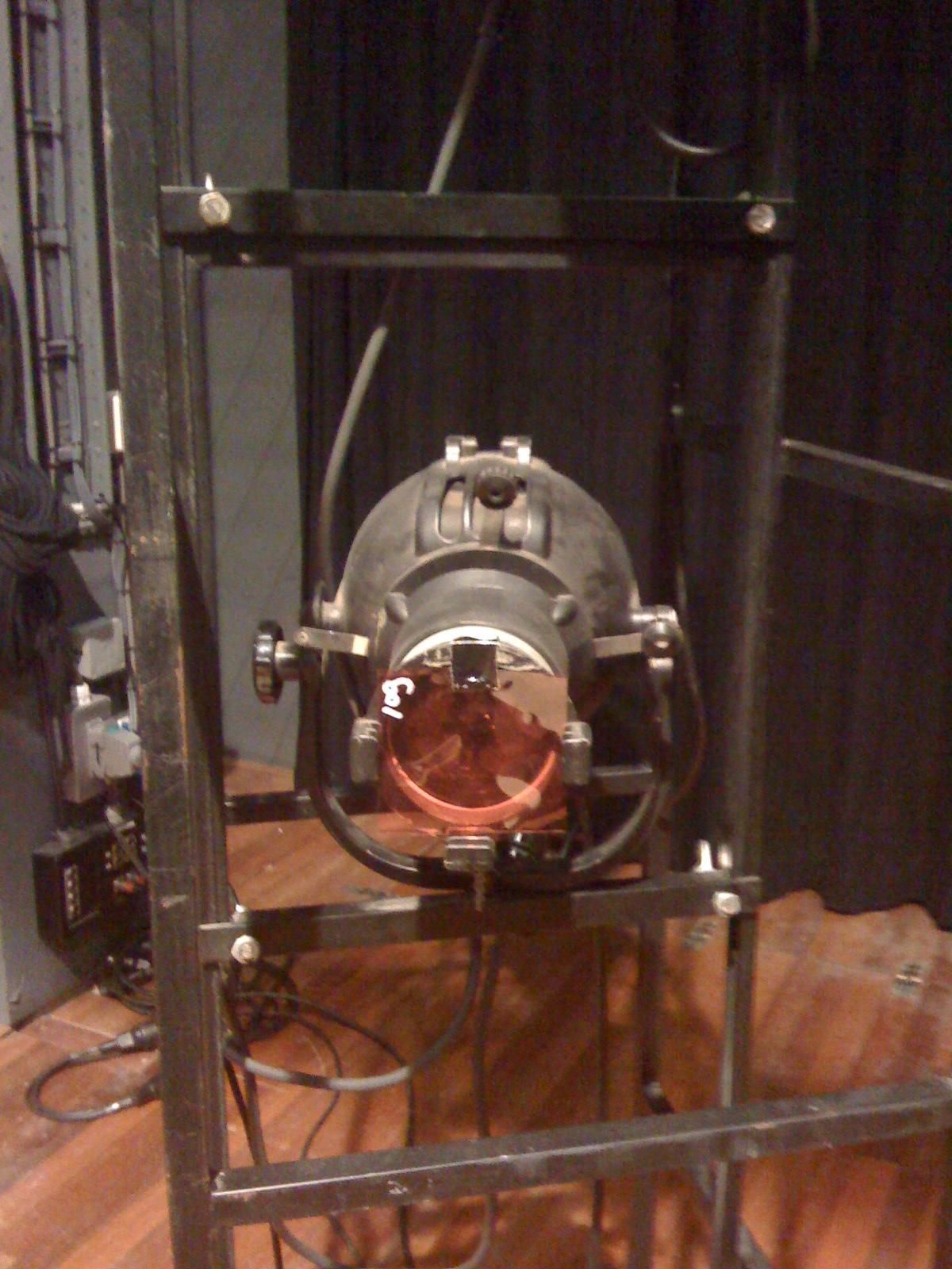 Een Pipo, vooraanzicht